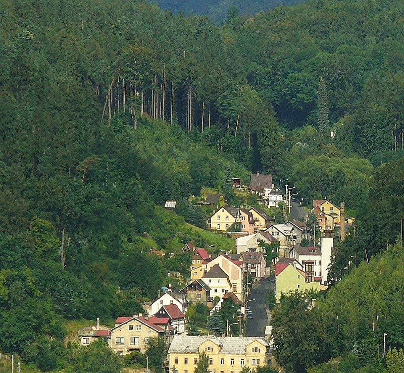 Pohled na Přípeř od děčínské nemocnice